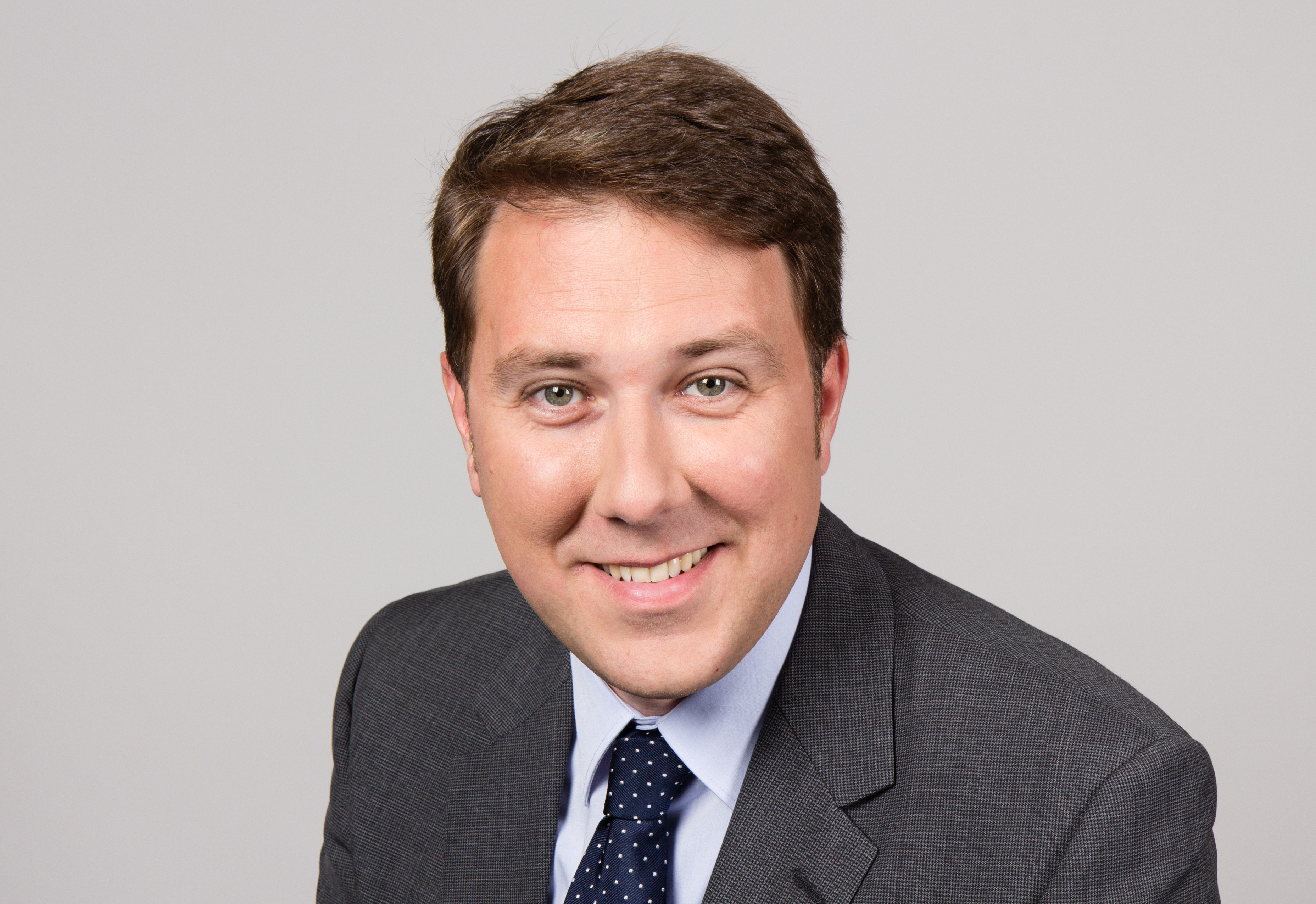 Markus Tressel (* 17. April 1977 in Saarlouis) ist ein deutscher Politiker (Bündnis 90/Die Grünen). Wikipedia-Bundestagsprojekt 2014 8–12 September 2014 in BerlinThis file was taken during the project “Wiki loves parliaments/Bundestag 2014” (German). Organisation: Martin Rulsch, Olaf KosinskyDesign: Martin KraftPhotography: Foto-AG Gymnasium Melle (Jan-Kristof Blömke, Lukas Eismann, Moritz Kosinsky, Laura Lessing, Karsten Mosebach, Mascha Mosebach, Teresa Schreer, Noah Sewöster, Niklas Tschöpe), Olaf Kosinsky, Martin Kraft, Harald Krichel, Steffen Prößdorf, Ralf Roletschek, Martin Rulsch, Gerd Seidel, Sven TeschkeVideo: Marc Rudnick, Manuel SchneiderEditors: Marcus Cyron, Günter Fremuth, Martin Kraft, Robin Krahl, Harald Krichel, Martin Rulsch, WikiAnikaReception: DasMonstaaa, Leonie Rabea Große, Lutheraner, Nina Möllering, Martin Rulsch, WikiAnika, Foto-AG Gymnasium MelleCosmetics: Regina Bosak, Bettina Dieguez, Sandra Kobbe, Andrea Strehlke; Irada Abdullayeva, Vivien Abelmann, Olena Engelbrecht, Sarah Fabini, Nina Magnus, Jacqueline Schmidt, Leonie Taboada, Julia Willer Usage information If you need more information how to use this file, please send an email to . Personality rights warningAlthough this work is freely licensed or in the public domain, the person(s) shown may have rights that legally restrict certain re-uses unless those depicted consent to such uses. In these cases, a model release or other evidence of consent could protect you from infringement claims.